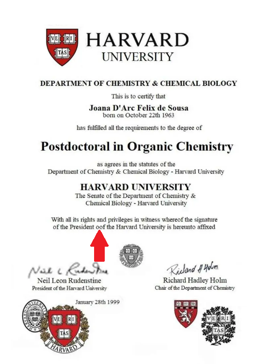 Indicação de falsificação de diploma